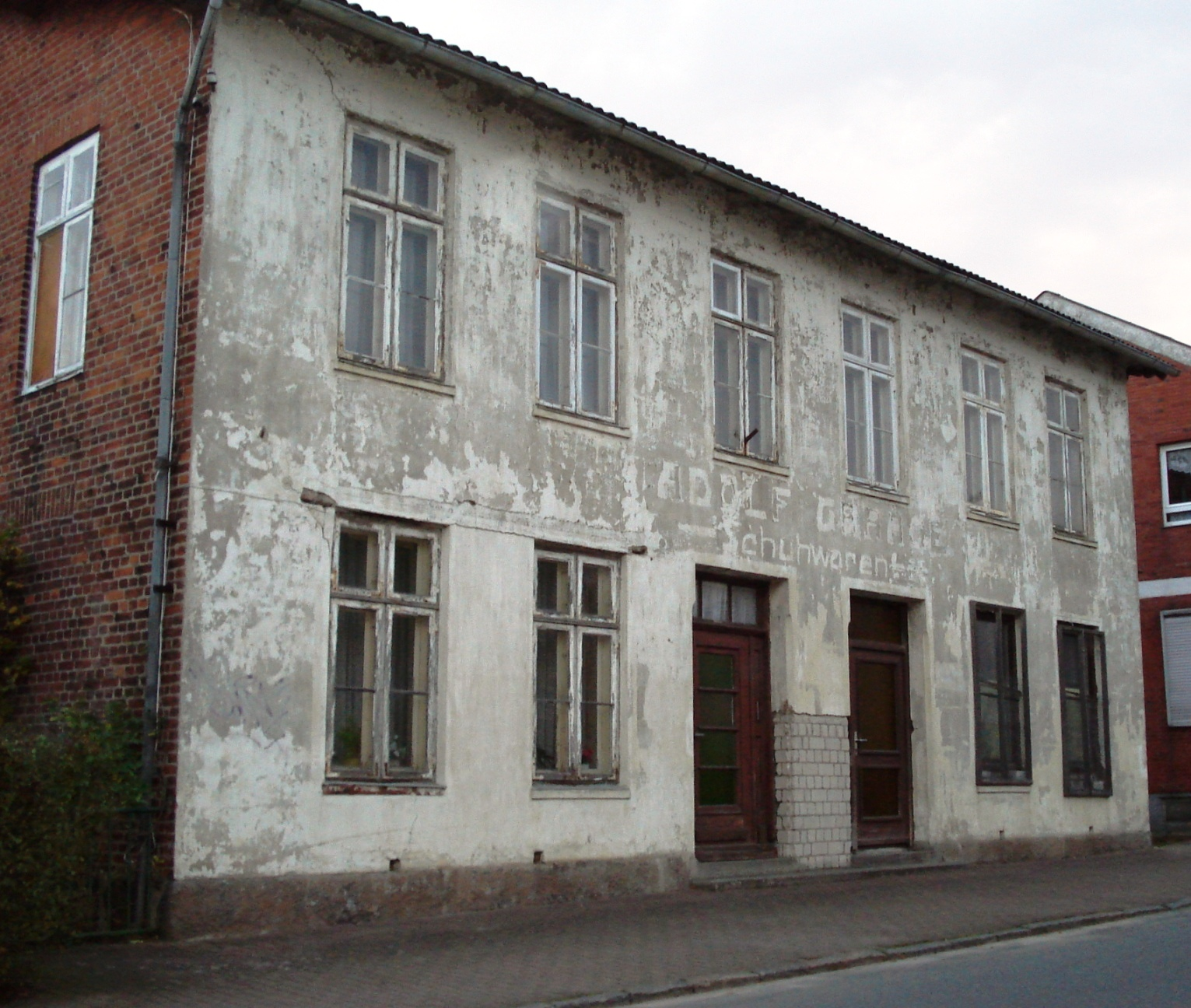 Das Gebäude des "Schutzhaftlagers Ahrensbök"